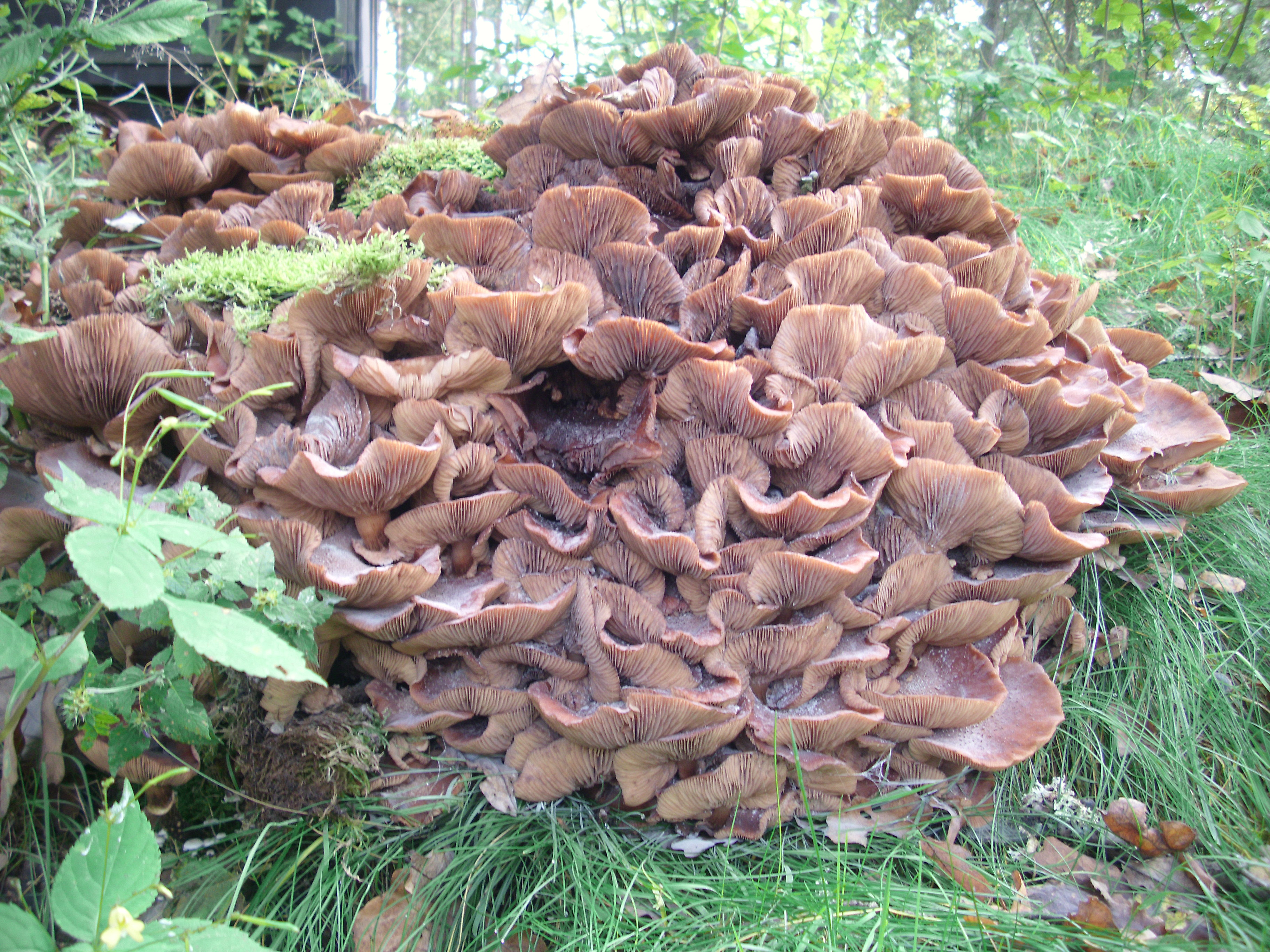 Pilzbewuchs eines Stubben nahe der Schlaubemühle, Naturpark Schlaubetal, Brandenburg